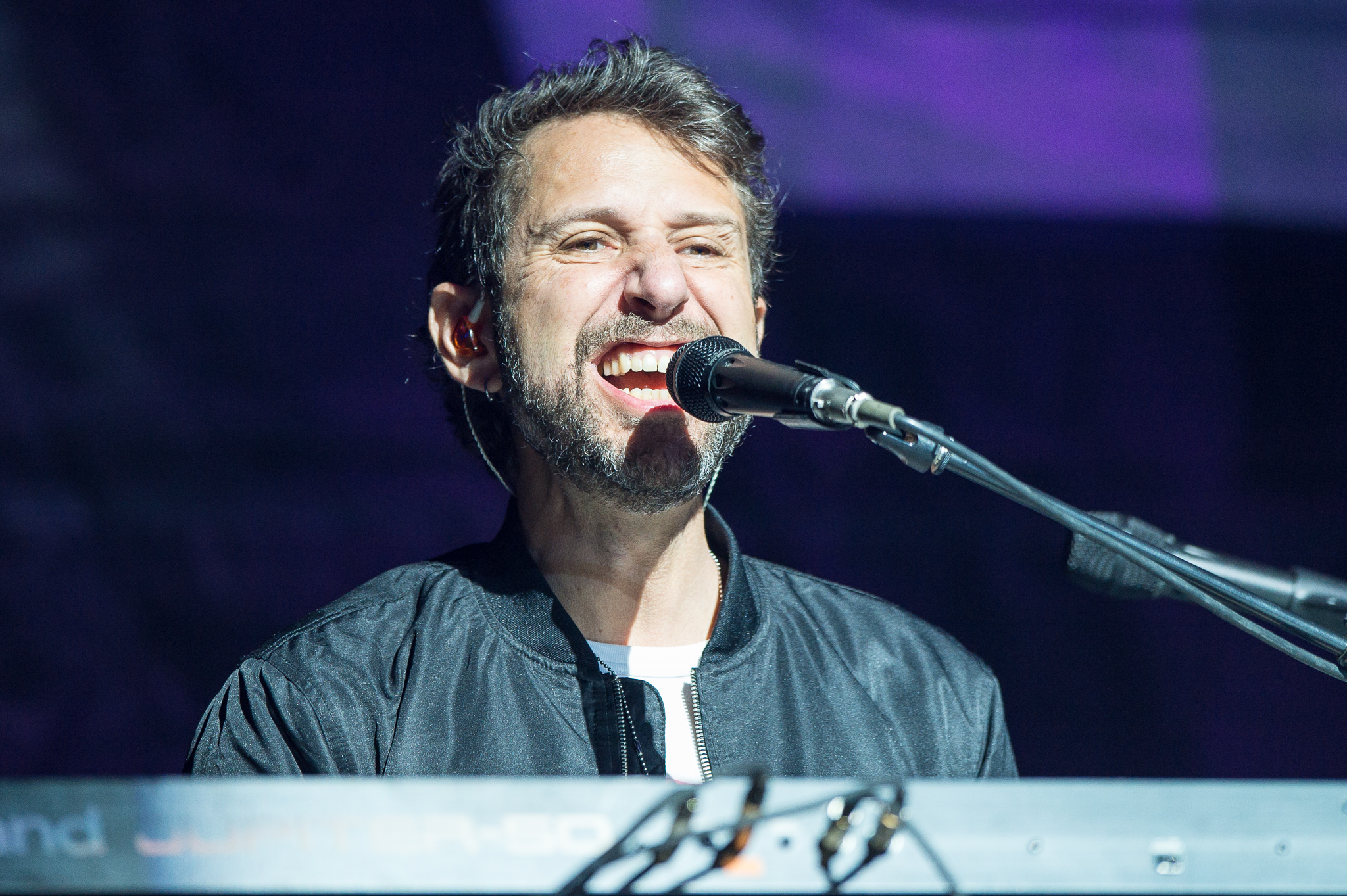 Brombachsee,Concertbüro Franken,Festival,Foreigner,Konzert,Lieder am See,Livekonzert,Livemusik,Michael Bluestein,Musik